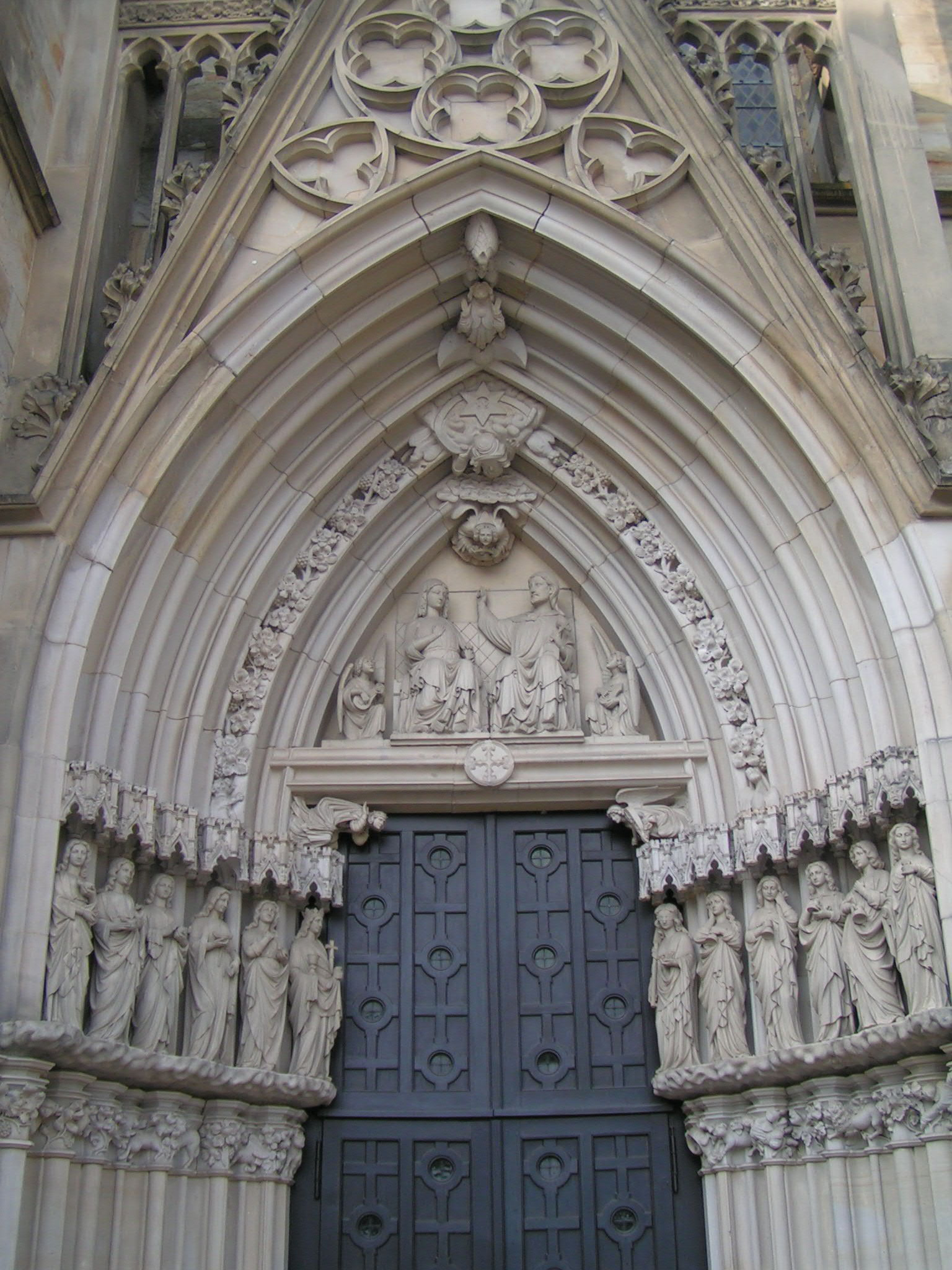 Eingangsportal der Marienkirche in Osnabrück